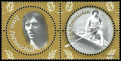 Romania 2004 stamp Ivan Patzaichin